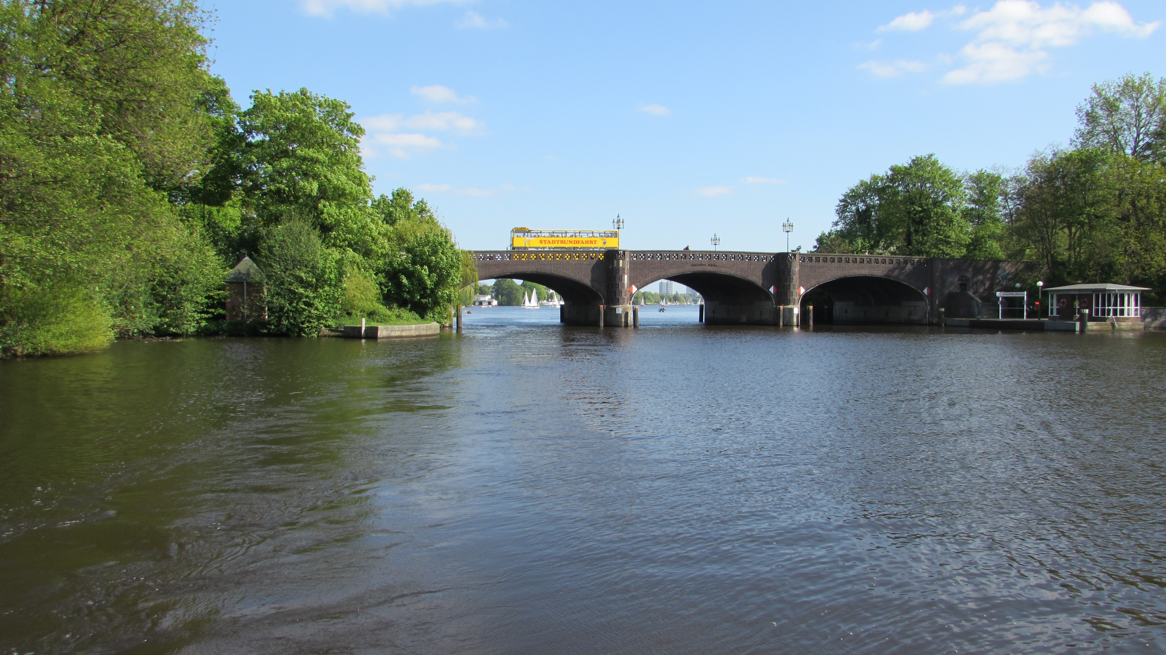 HamburgKrugKoppelbrücke